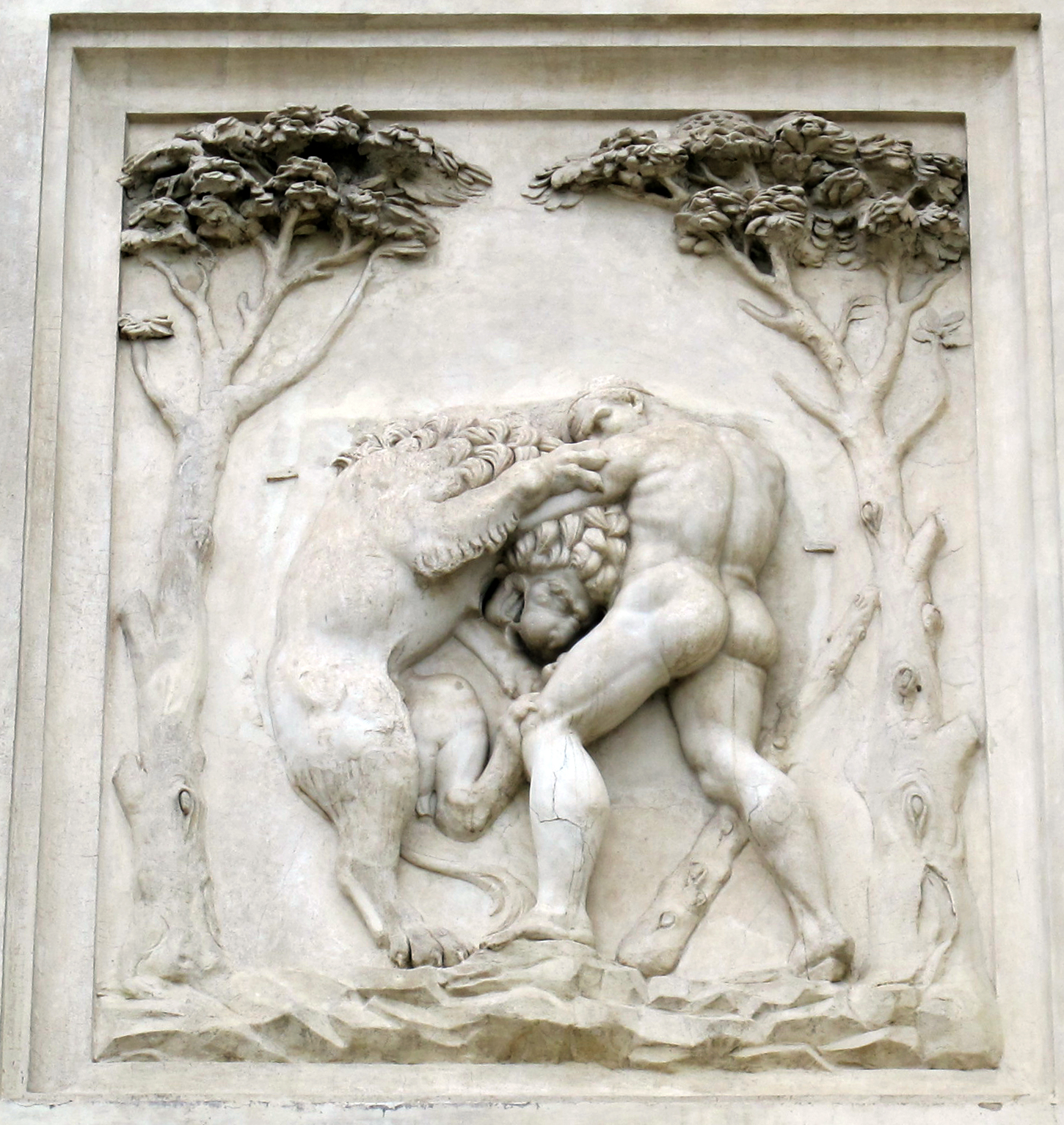 Villa Medici, Roma